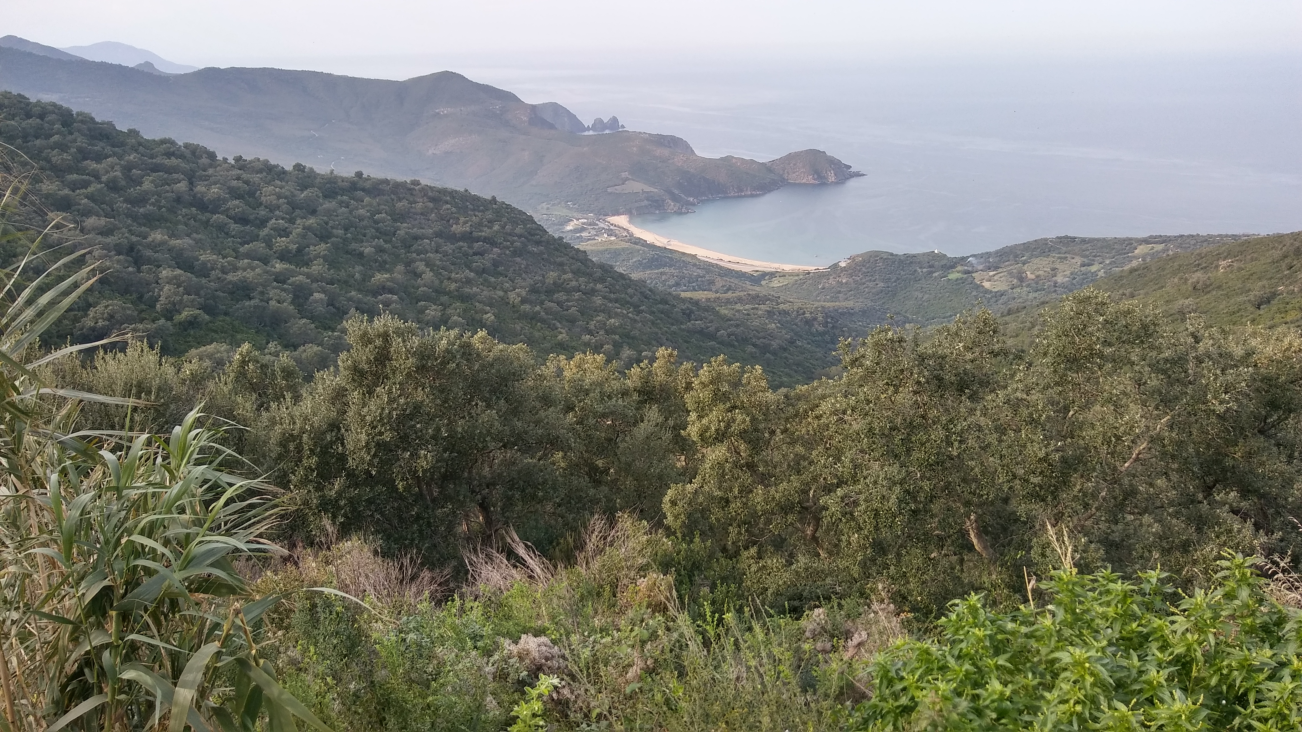 Annaba beach